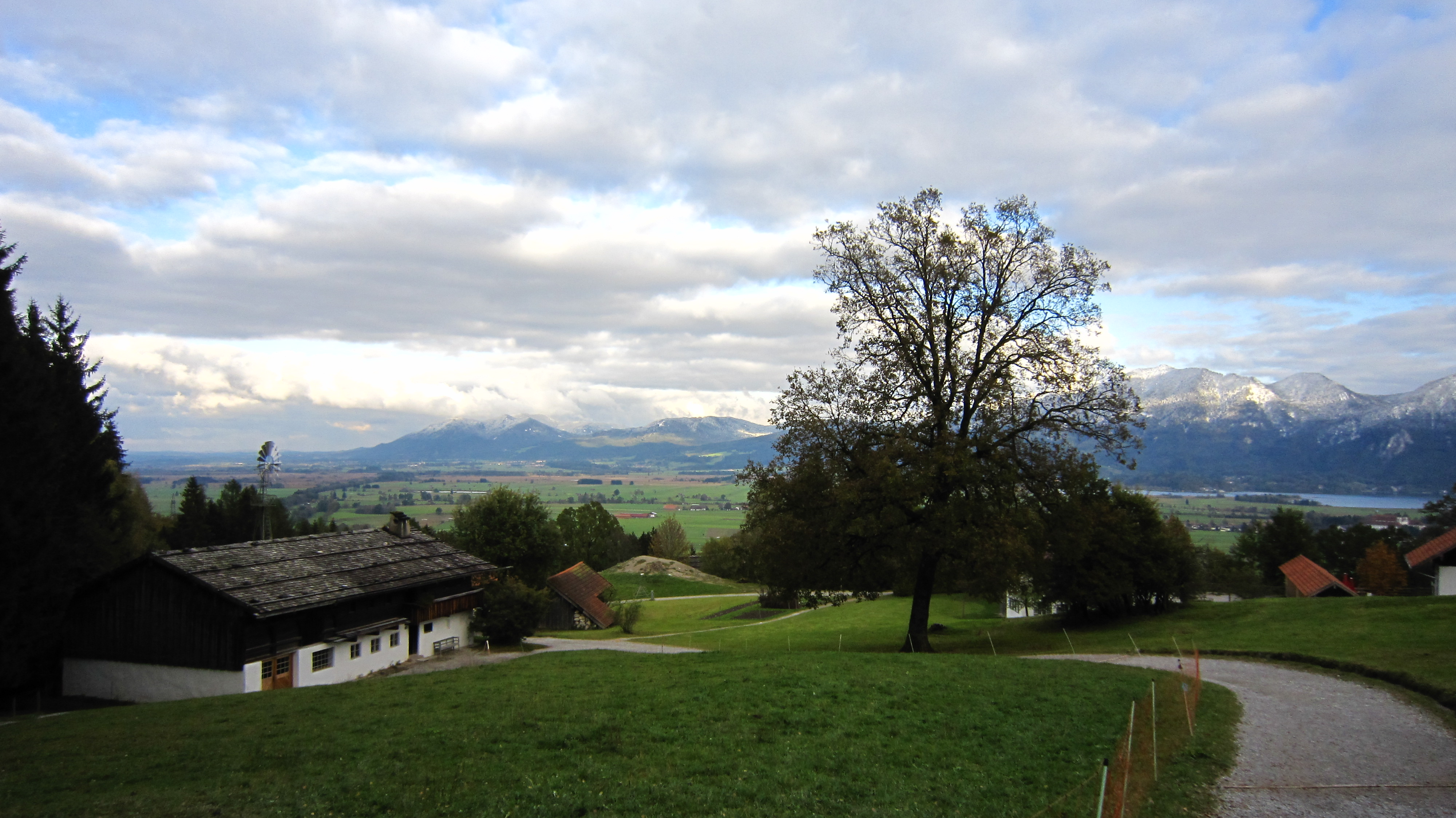 Freilichtmuseum Glentleiten Nr. 64: Wohnhaus eines Vierseithofes aus Heretsham, Hausname „Mörner“, erbaut um 1597, umgebaut 1796; mit Blick ins Loisachtal